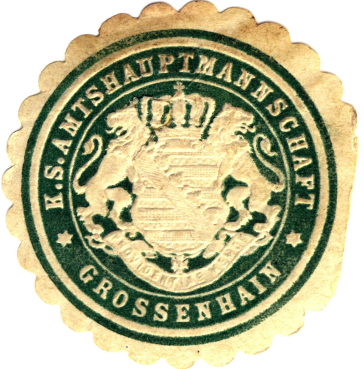 Siegelmarke der Amtshauptmannschaft Großenhain